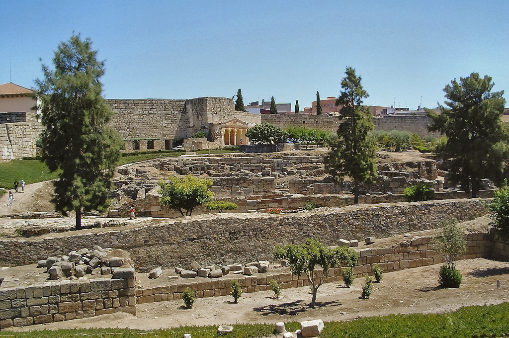 Interior de la Alcazaba de Mérida - Spain. En primer plano pueden observarse los cimientos del fuerte romano anterior